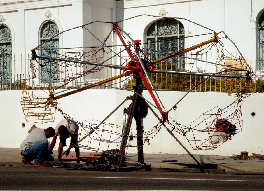 Karussell in Santiago de Cuba